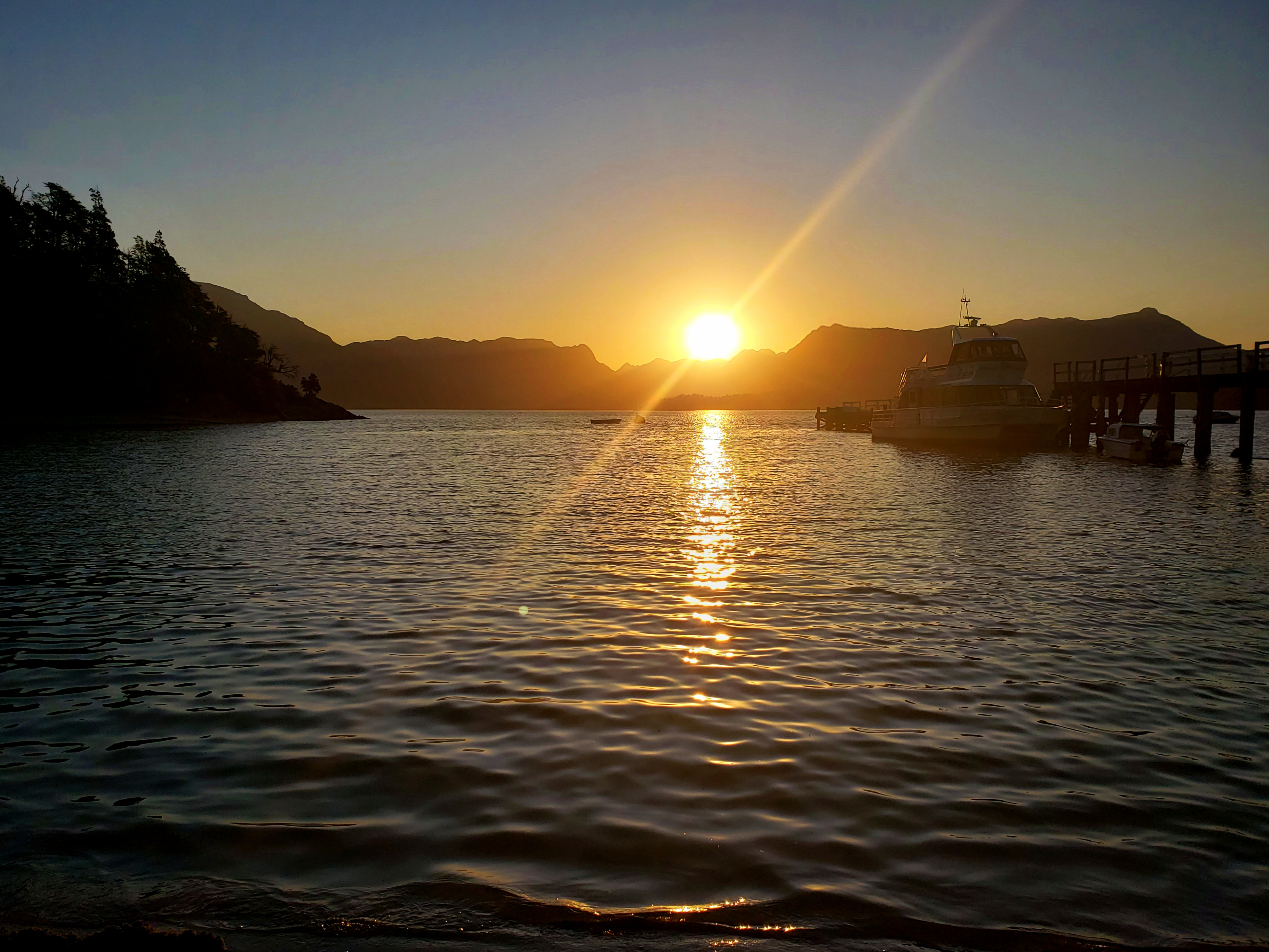 Vista desde la playa de la Bahía Brava, Villa La Angostura, Neuquén, Argentina